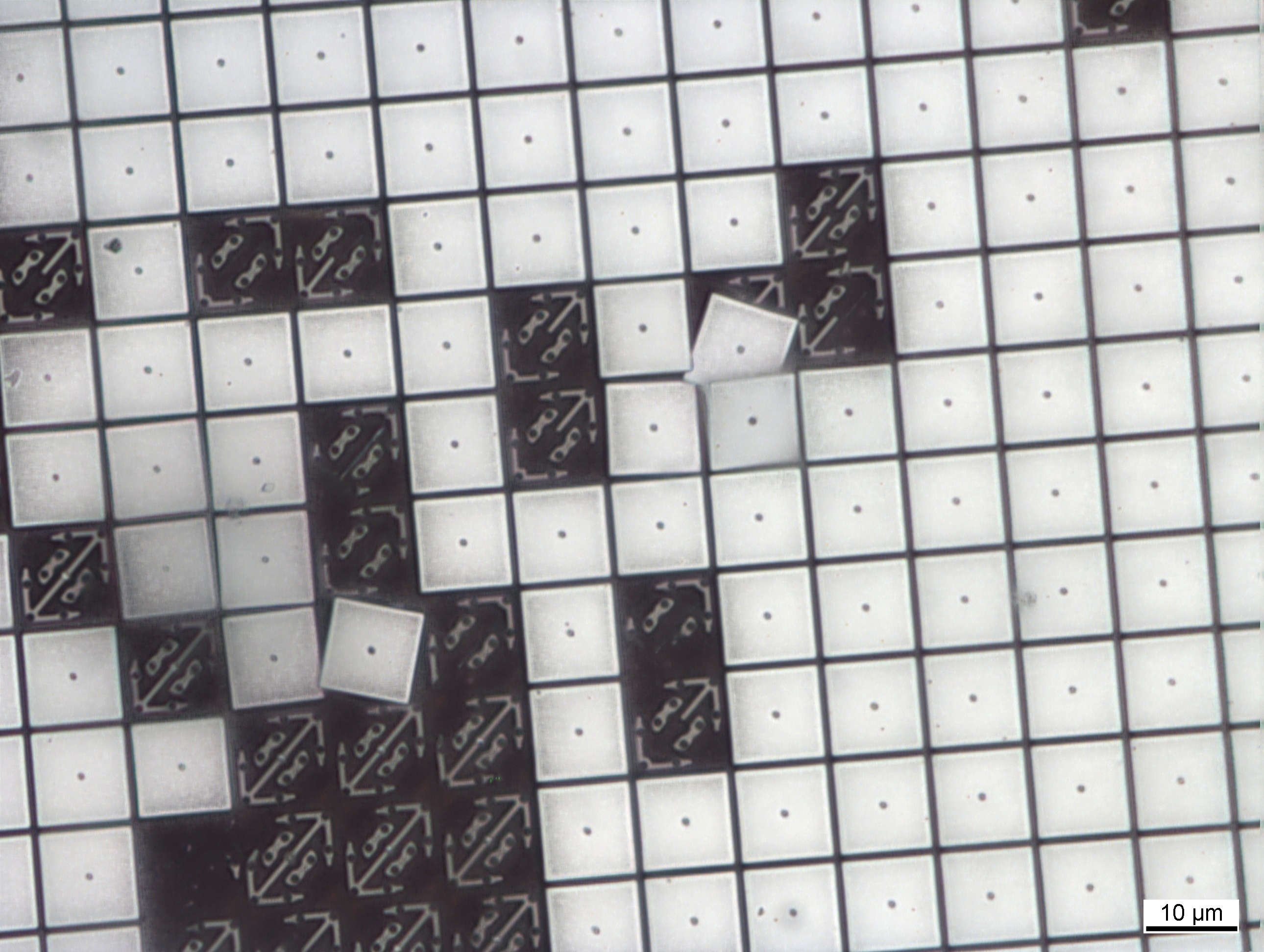 Defekter DLP-Chip eines Acer P1265 (1024x768). Jedes Spiegelchen entspricht einem Pixel.